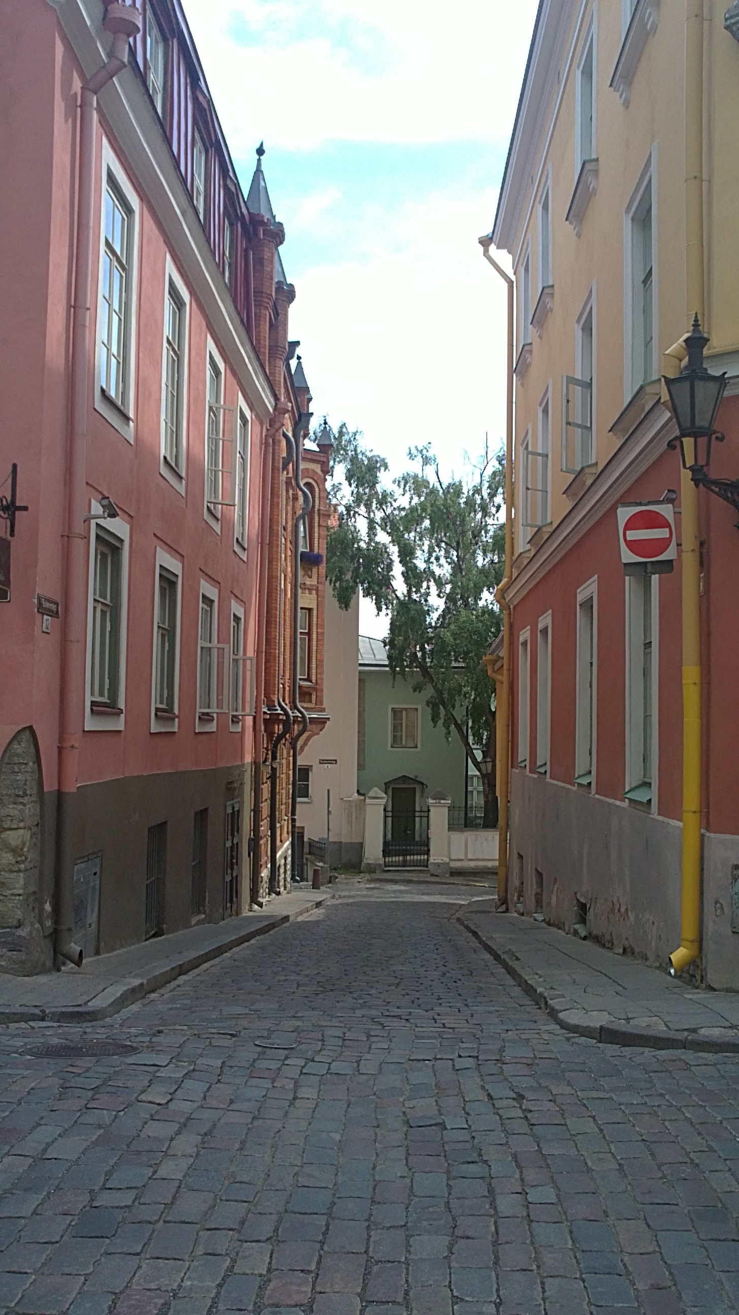 Vaade Sulevimäele Pikalt tänavalt, Tallinna vanalinn